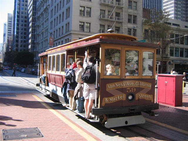 Кабелен трамвай на МЮНИ по линия "улица Калифорния" в Сан Франциско, щата Калифорния, САЩ. (авторска снимка)